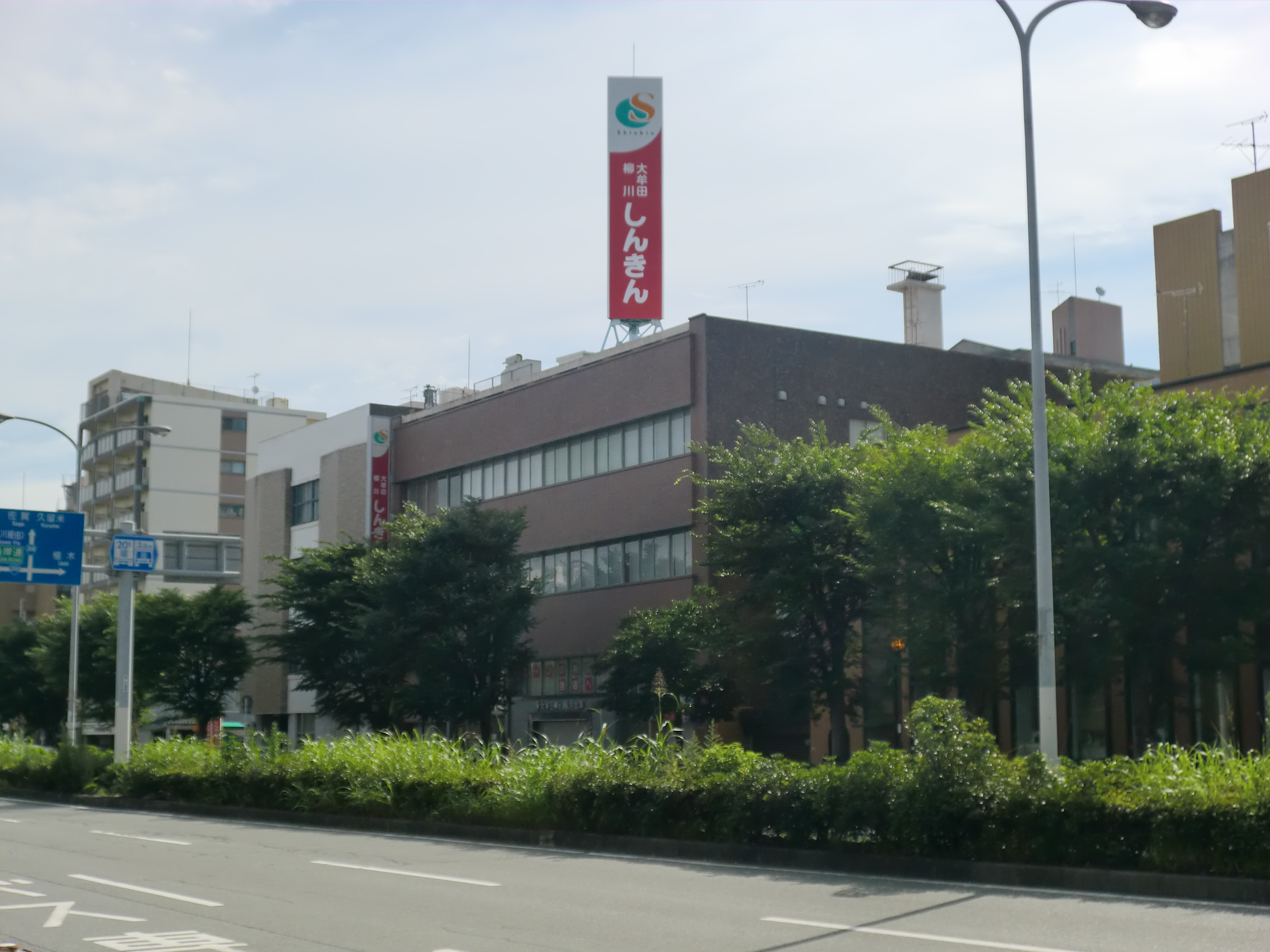 福岡県大牟田市にある大牟田柳川（おおむたやながわ）信用金庫本店